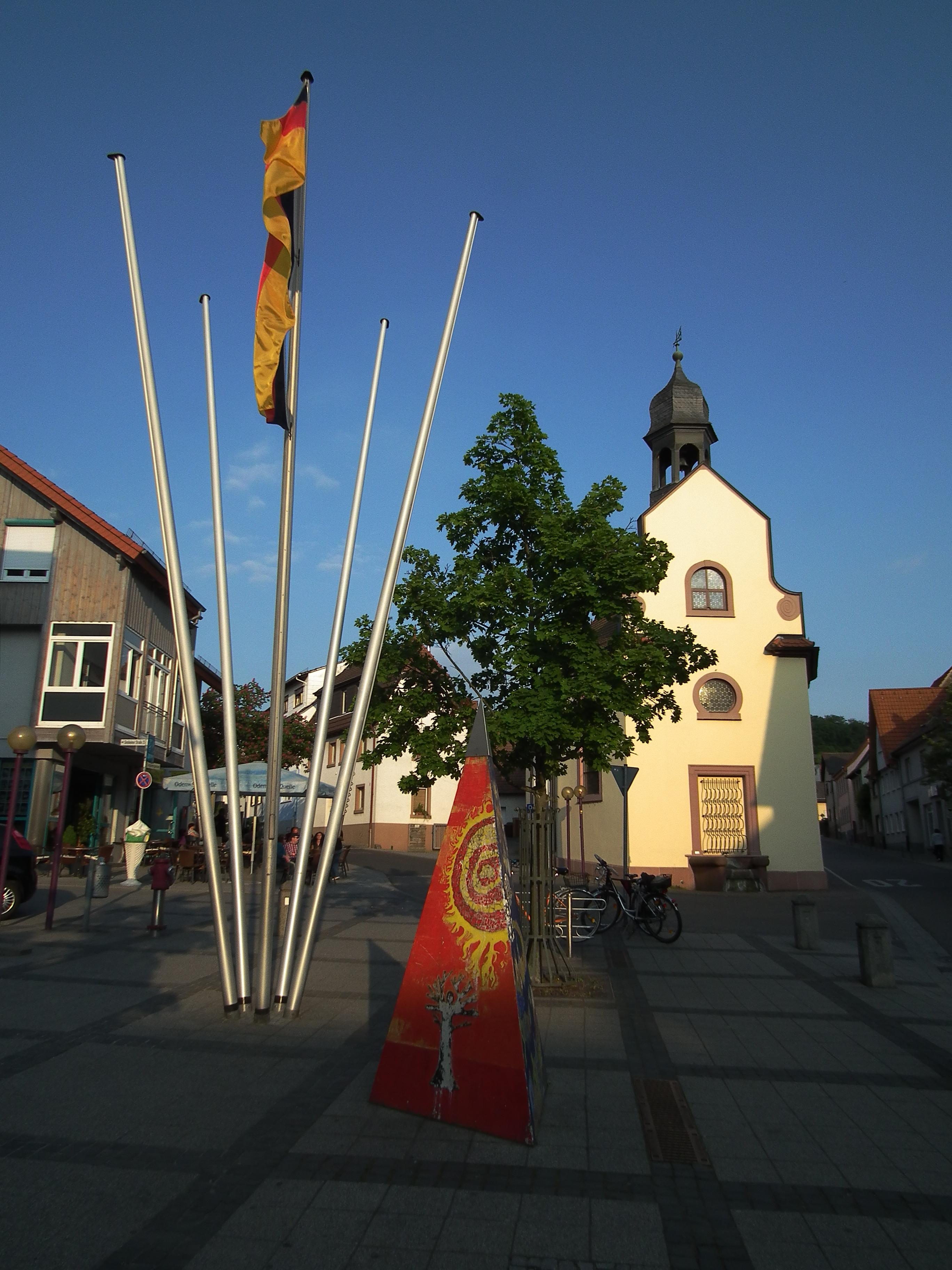 In der früheren lutherischen Kirche untergebrachte Bücherei der Gemeinde Nußloch (Baden-Württemberg, Deutschland)